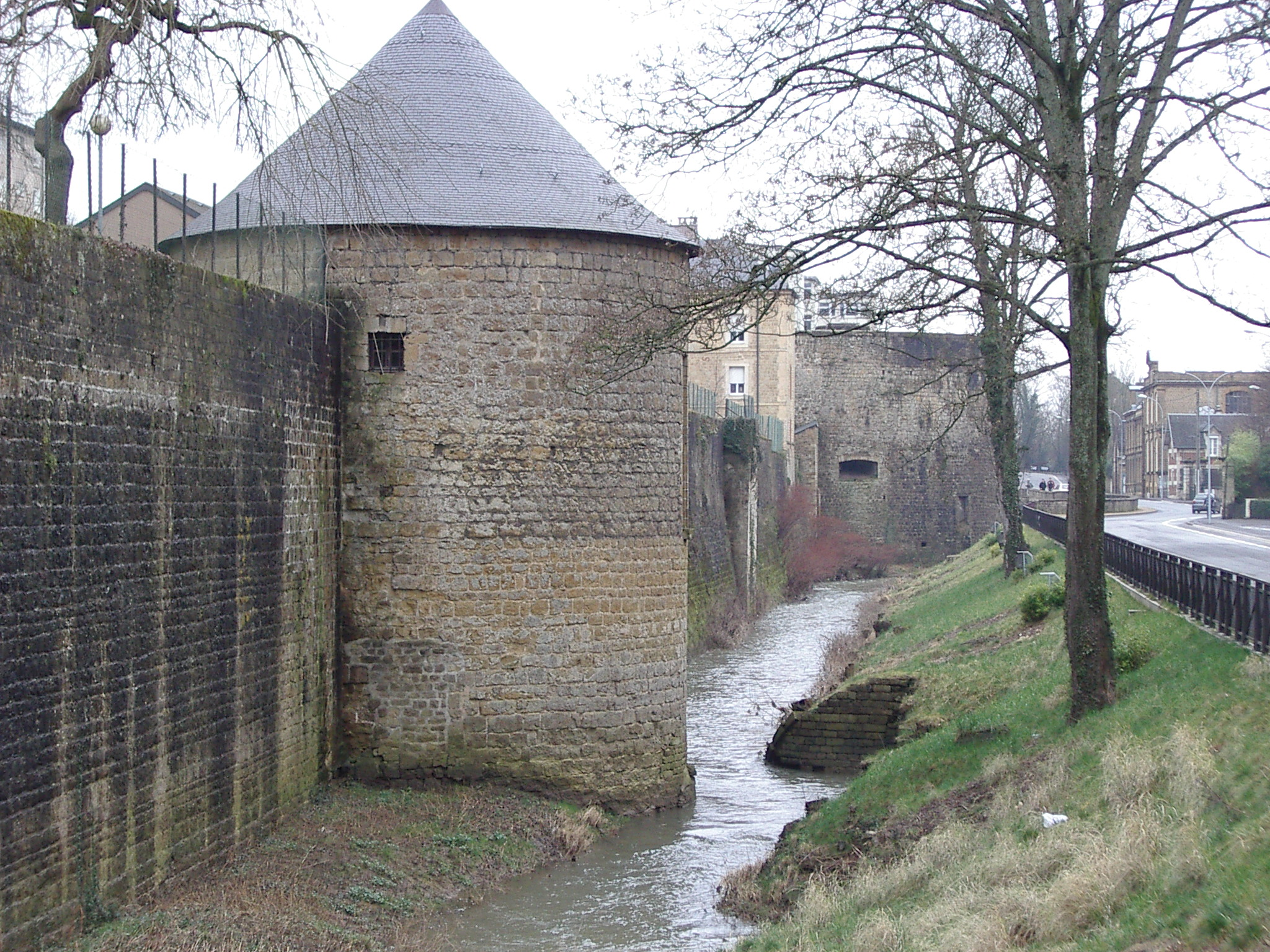 Les Fortifications de Mézières Charleville-Mézières Ardennes France